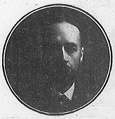 Fernando de Antón del Olmet, en la revista La Ilustración Española y Americana.